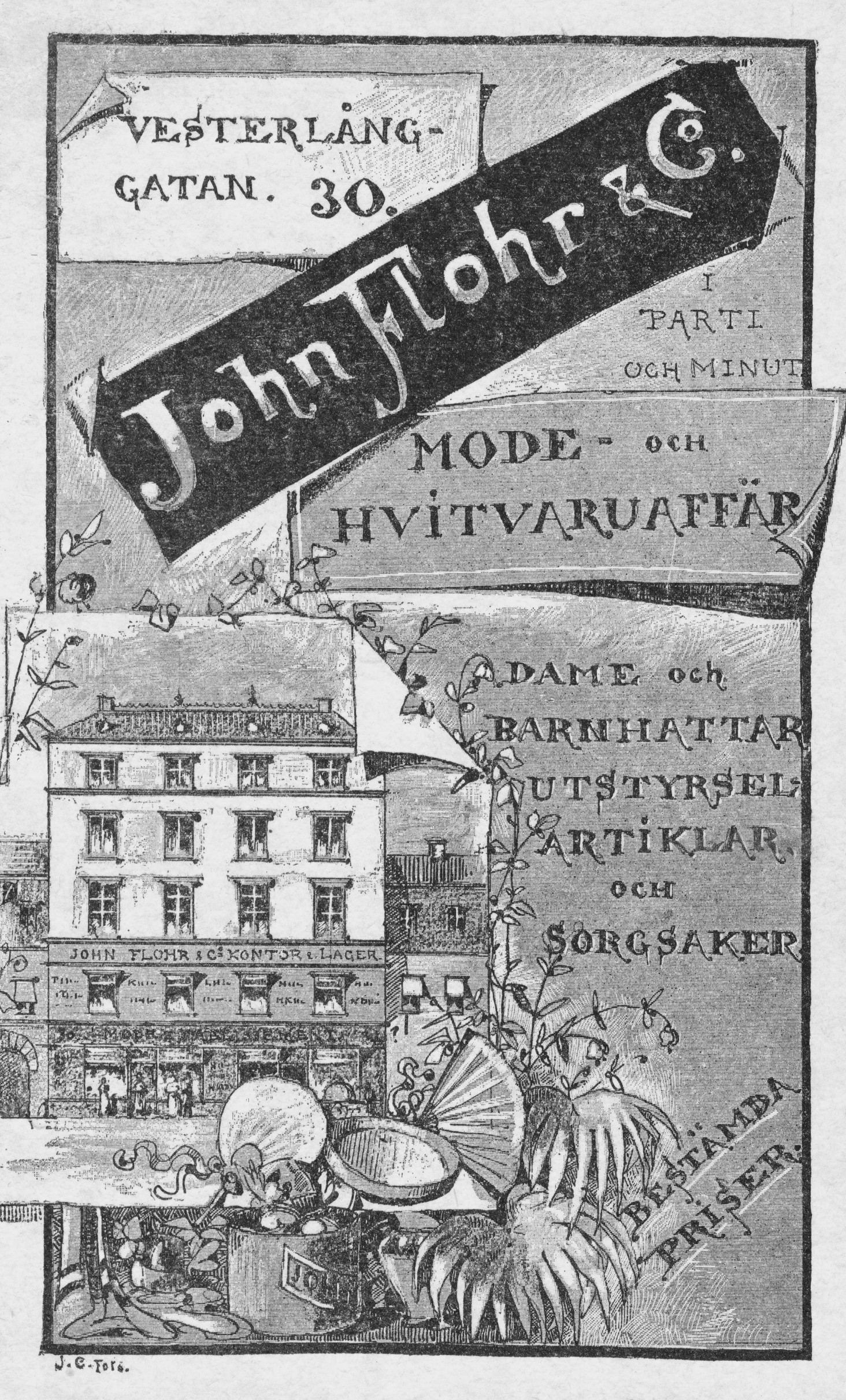 Reklam för John Flohr & Co , Västerlånggatan 30